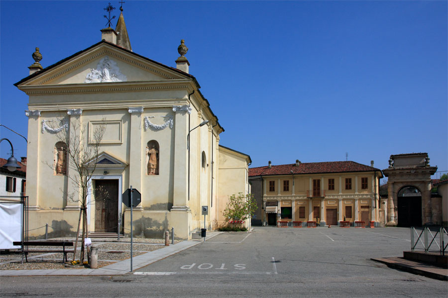 Veduta di Frassineto Po con la chiesa della Madonna degli Angeli